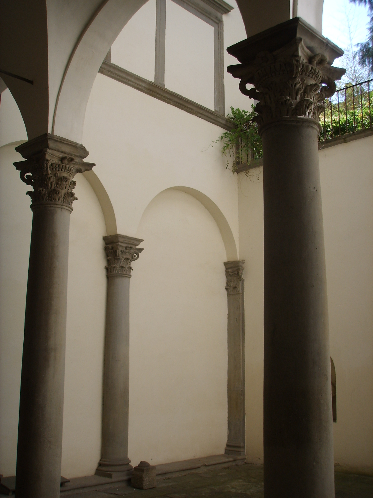 see description